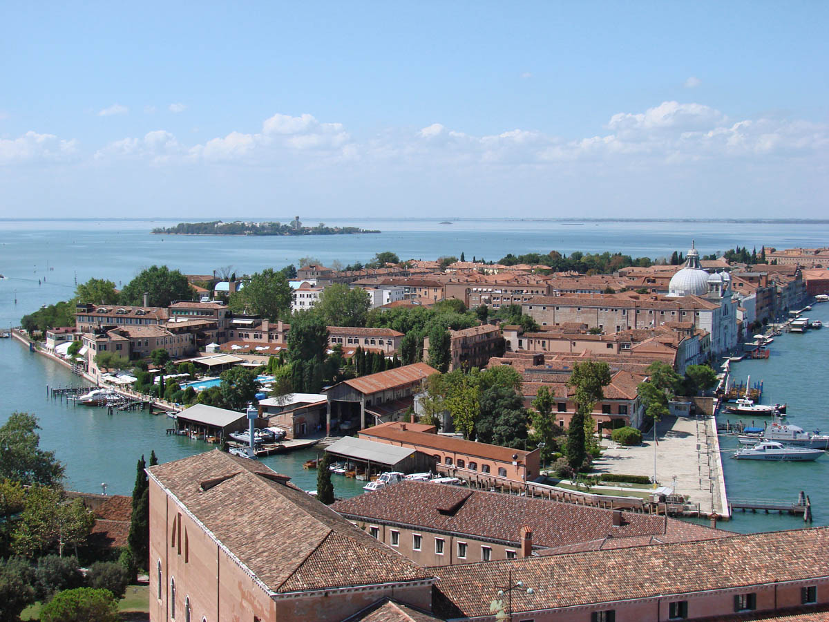 L'île de la Giudecca vue depuis le campanile de San Giorgio Maggiore. Le dôme sur la droite est celui de l'église du Rédempteur, conçue par Andrea Palladio après la peste de 1576 à la suite d'un voeu du Doge Alvise Mocenigo. A gauche, l'hôtel Cipriani et sa piscine.